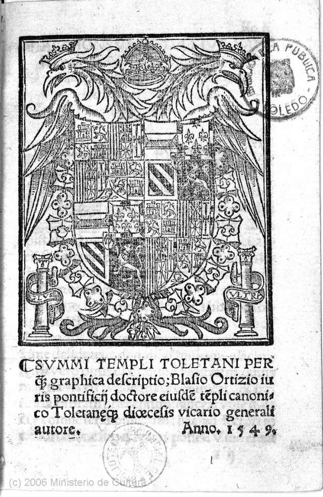 Portada de Summi Templi Toletani, de Blas Ortiz.